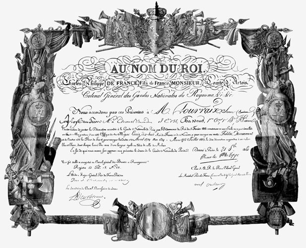 Diploma uit 1816